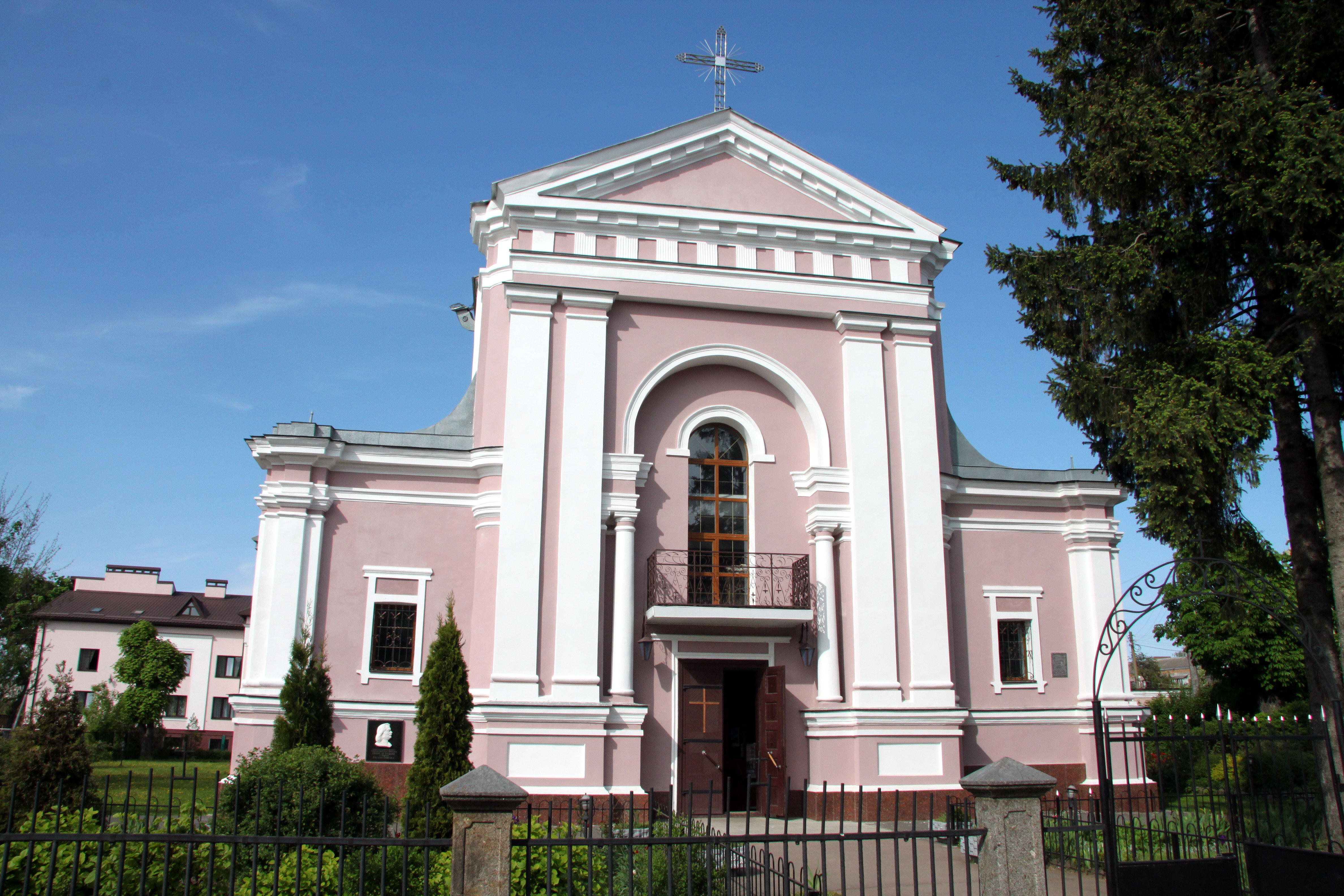 Костел св. Варвари, в якому в 1850 році вінчався Оноре де Бальзак, французський письменник, вул. Європейська, 25 (колишня вул. К. Лібкнехта, 25), Бердичів